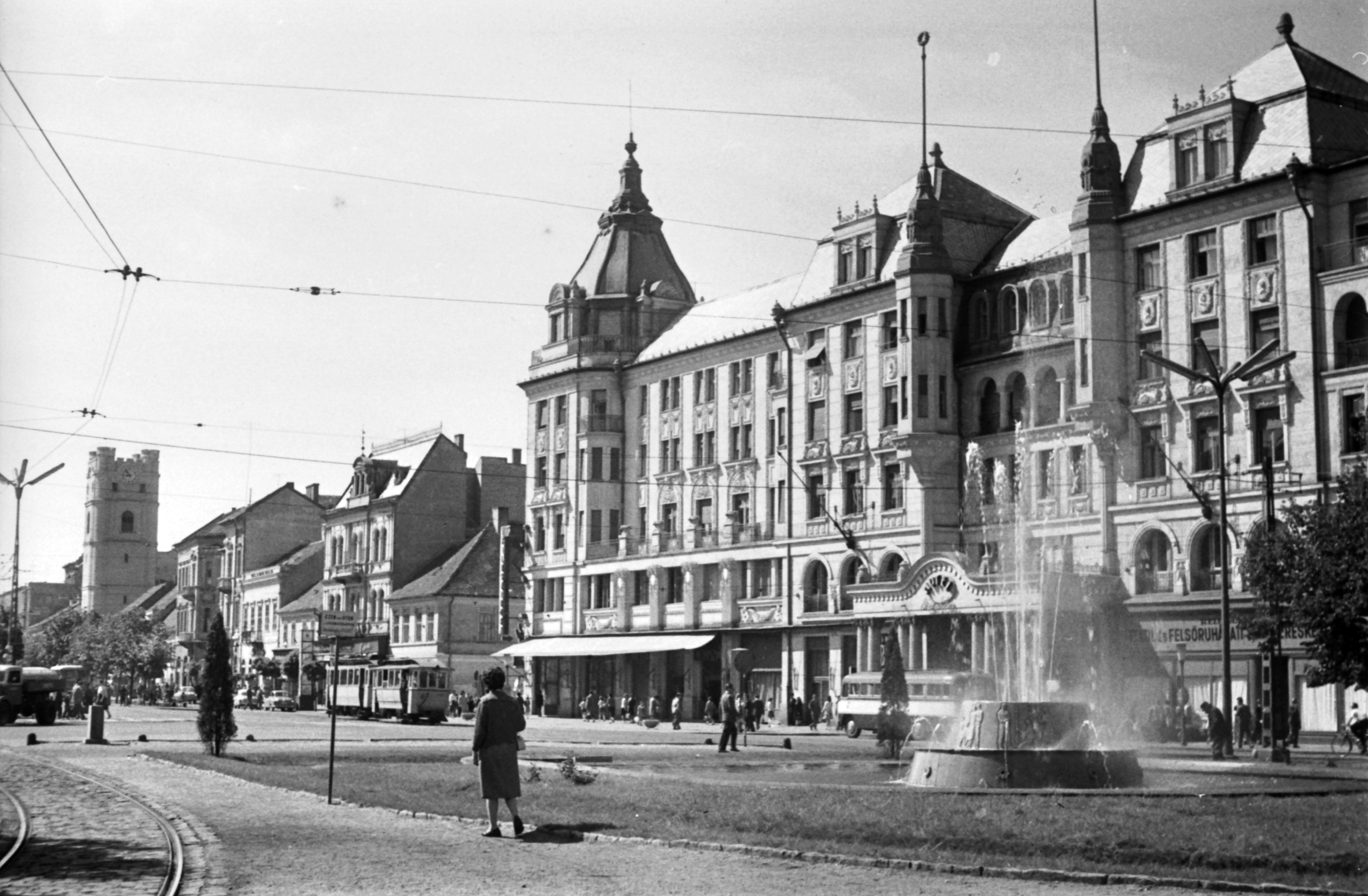 Piac utca, Arany Bika Szálló. Location: Hungary, Debrecen Tags: street view, traffic, genre painting, fountain, lamp post, tram, bus, architecture, hotel, Art Nouveau architecture, Alfréd Hajós-design Title: Piac utca, Arany Bika Szálló.